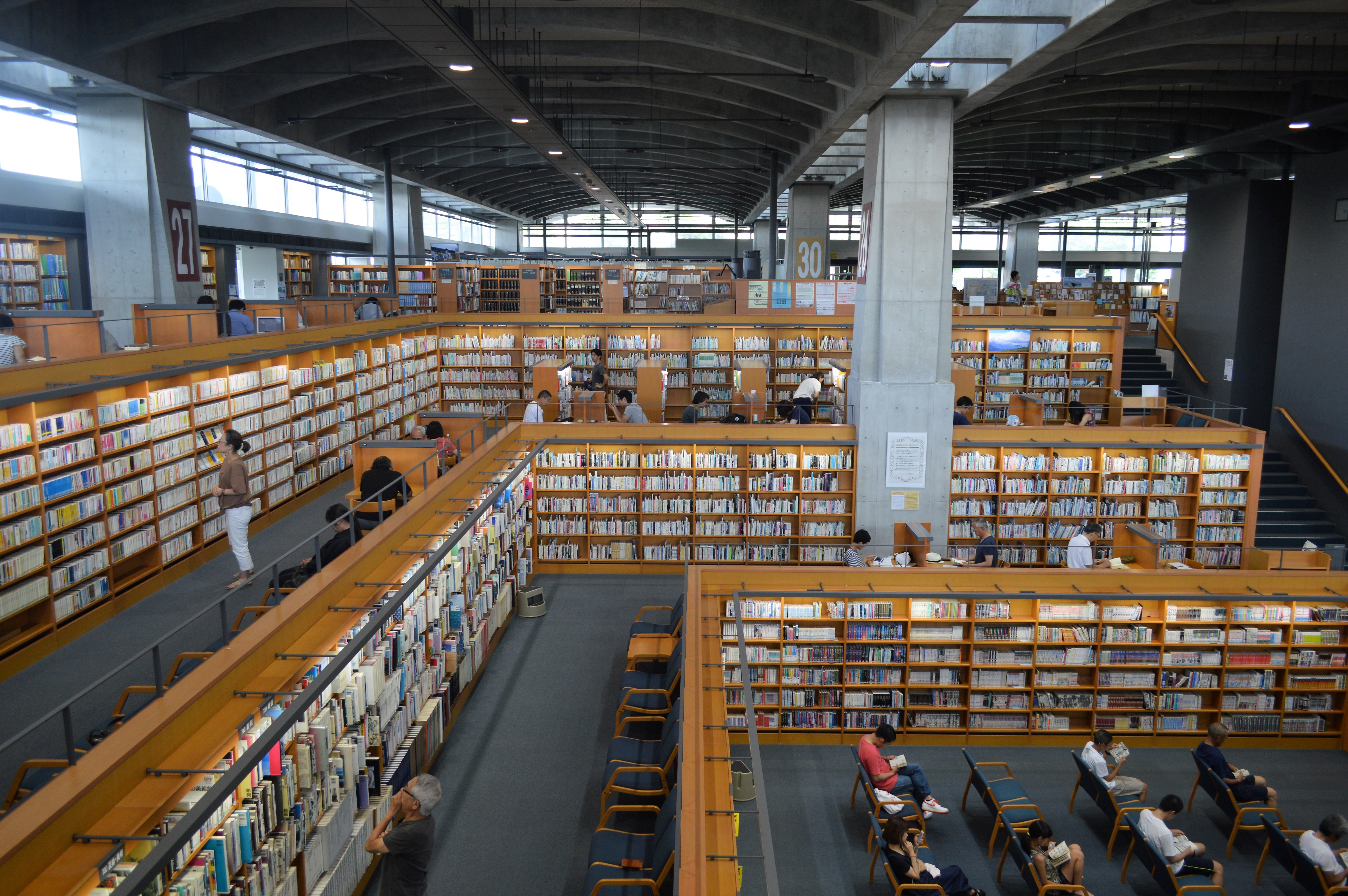 新潟県十日町市の十日町情報館。映画『図書館戦争』でも用いられた雛壇状の書架。